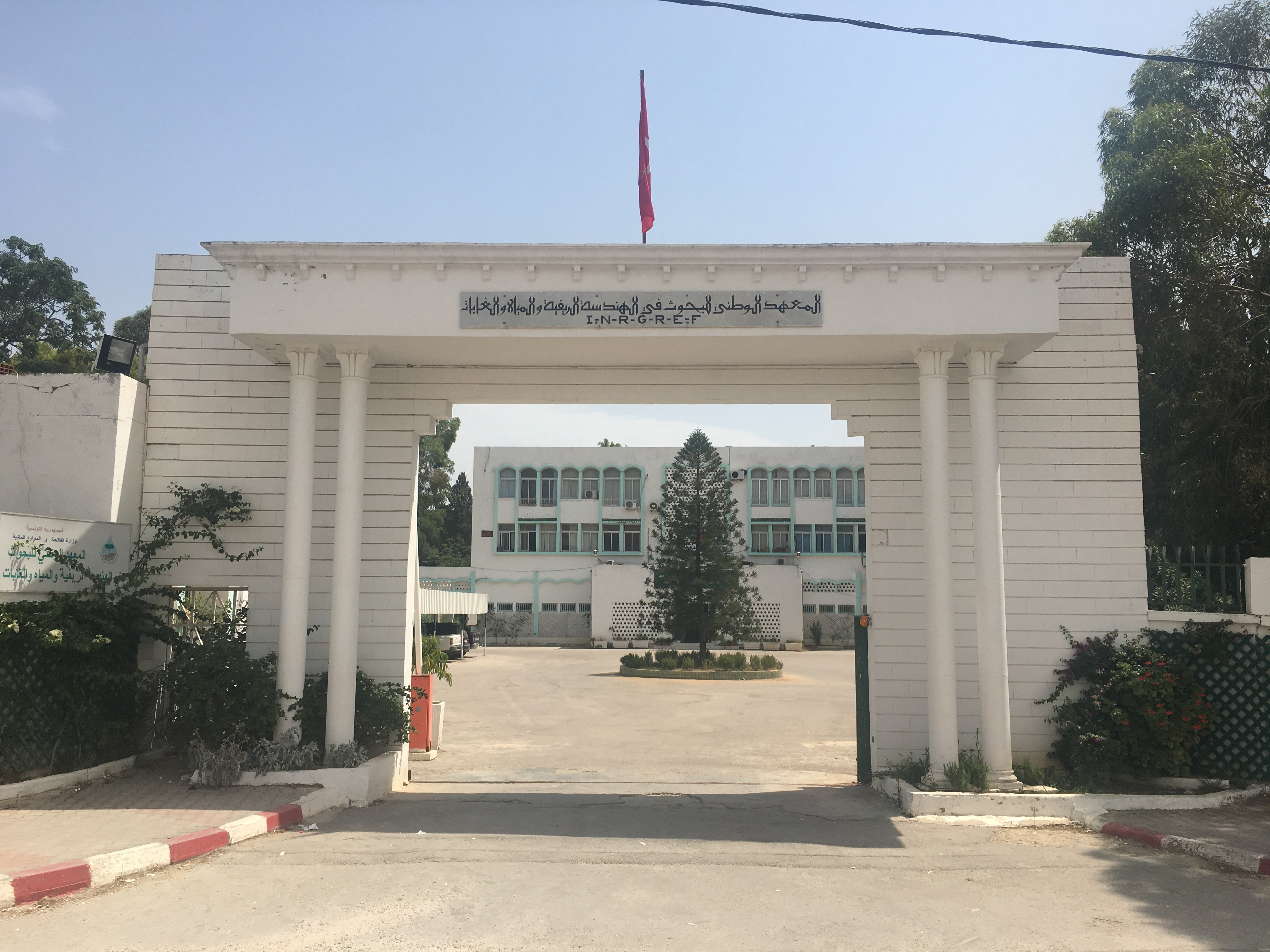 Entrée de l'Institut National de Recherches en Génie Rural, Eaux et Forêts (INRGREF) à El Menzah (Tunis), 2019.